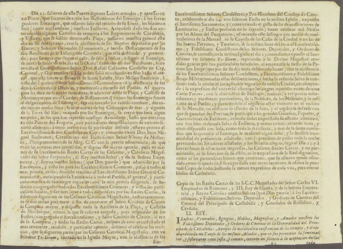 Gazeta de Barcelona - Diario del sitio de Barcelona. 22 de abril de 1714